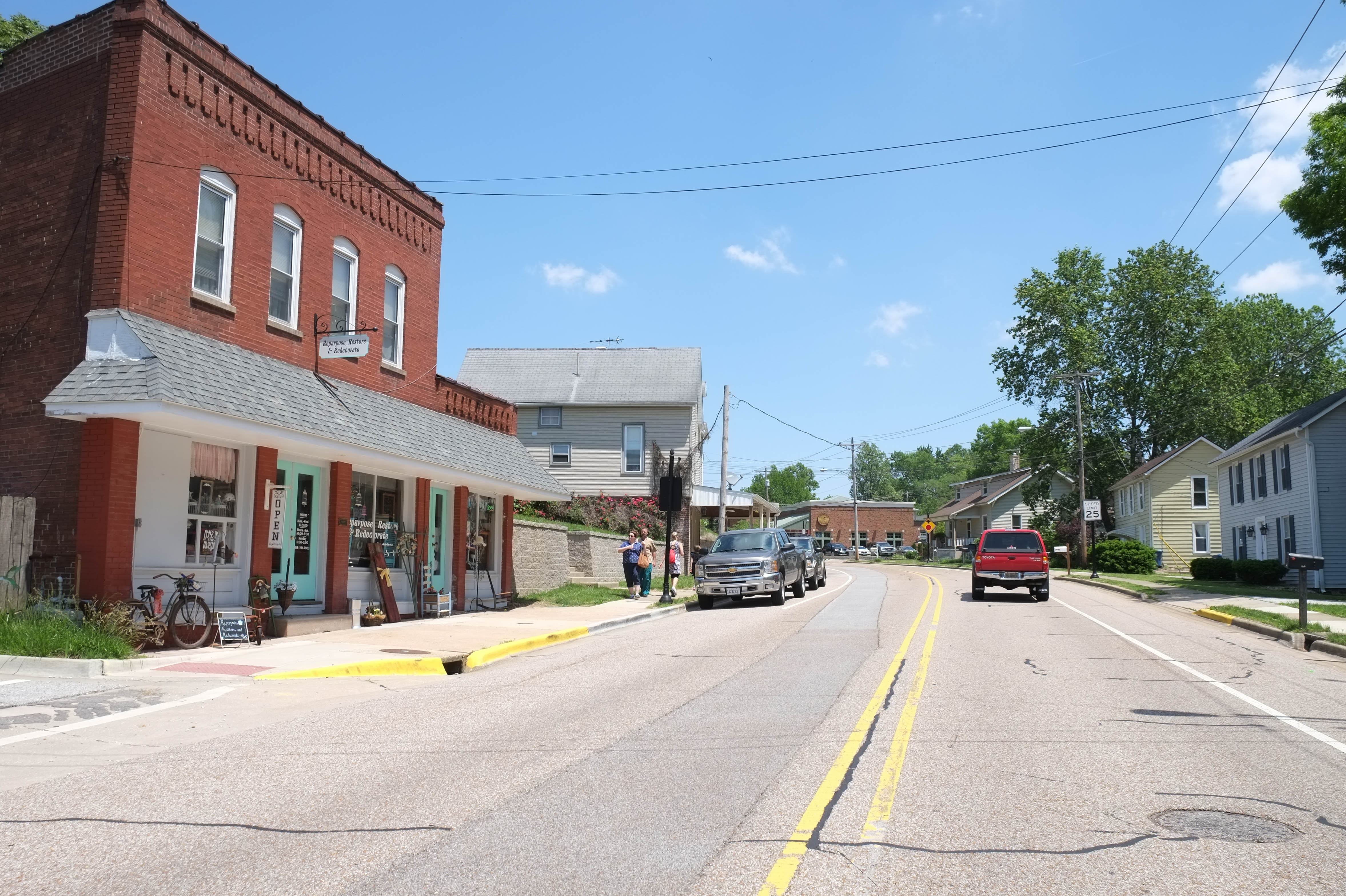 Glen Carbon, Illinois